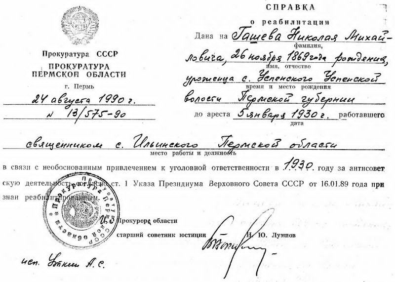 Справка